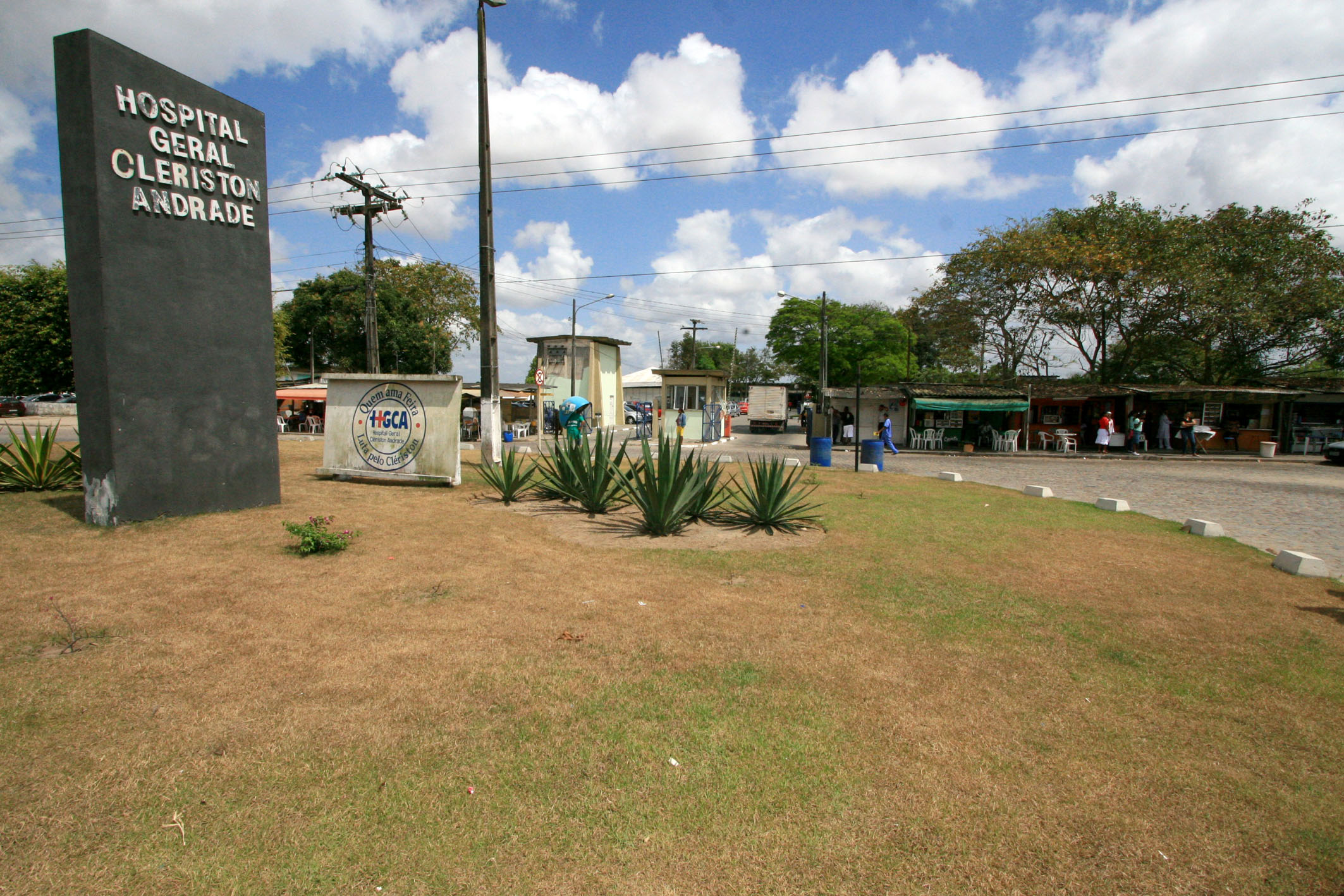 Hospital Clériston Andrade é entregue reformado e ampliado. Foto: Alberto Coutinho / AGECOM